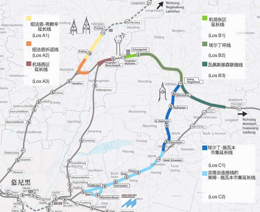 Bayerisches Staatsministerium für Wirtschaft, Infrastruktur, Verkehr und Technologie